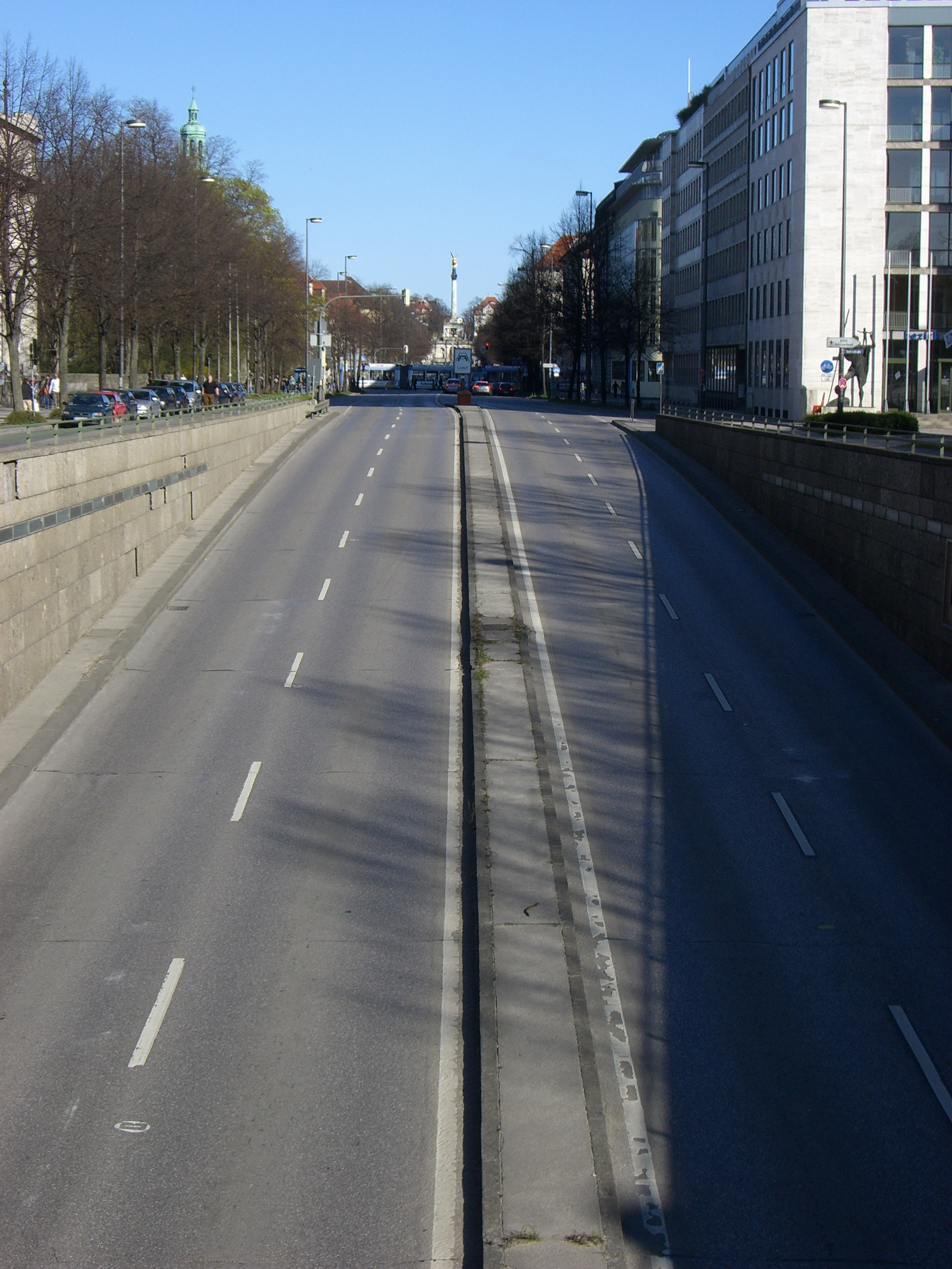 München: Prinzregentenstraße (vom Altstadtringtunnel)